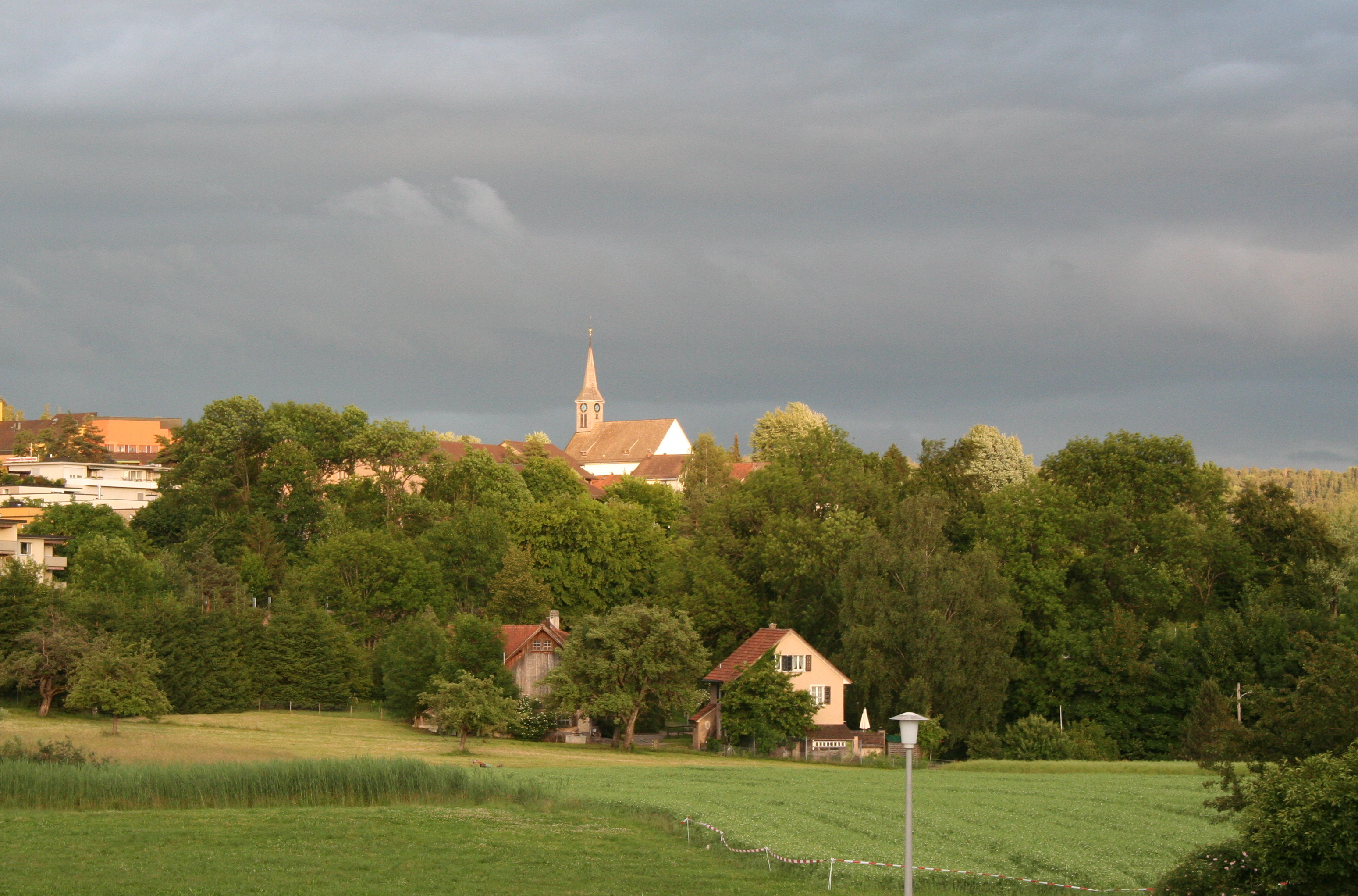 Zumikon, Ansicht von Norden